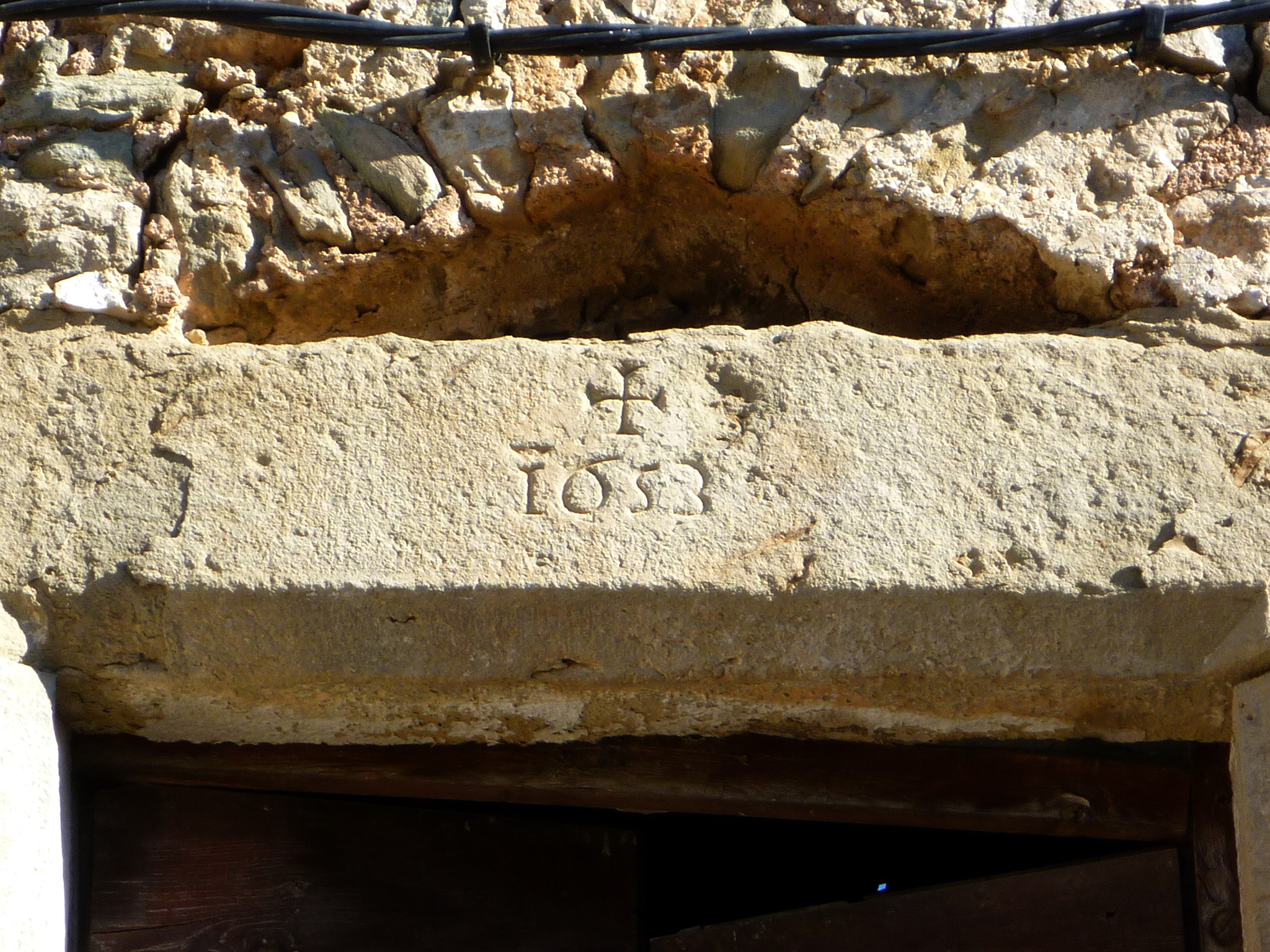 Cal Fuster de Santa Maria de Meià (Vilanova de Meià): llinda d'una finestra